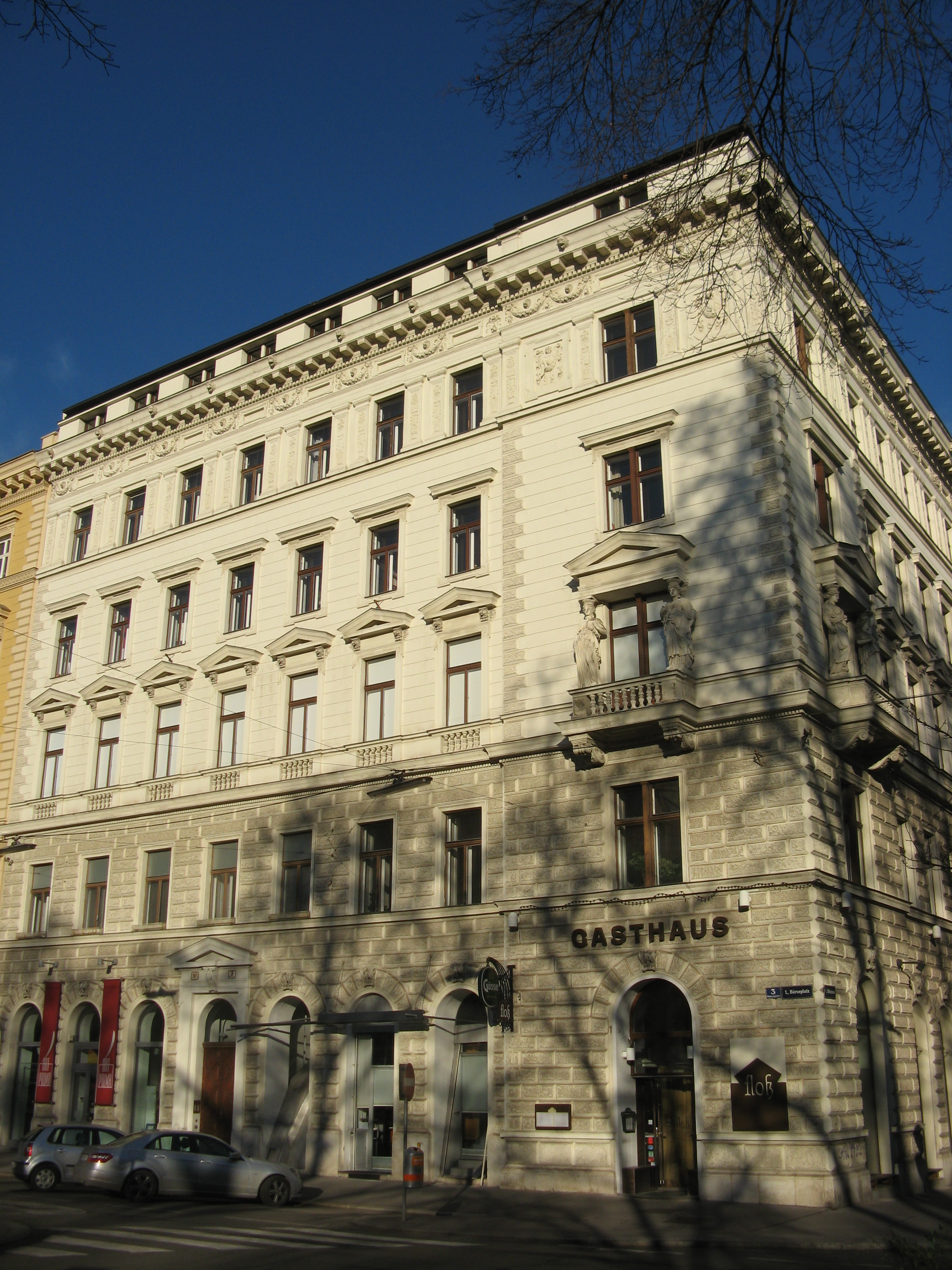 Ehemaliges Epstein-Haus (1871) von Theophil Hansen, Börseplatz 3, Wien-Innere Stadt